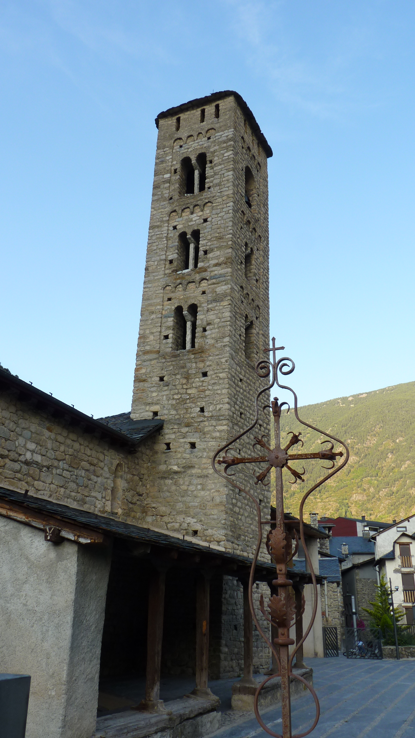 Església de Santa Eulàlia (Encamp), Andorra